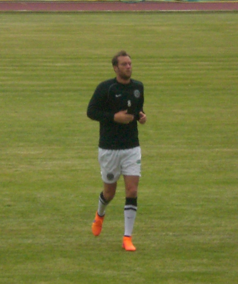 Jeffrey Rentmeister avant le match amical RC Lens - RWS Bruxelles, le 24 juillet 2015, au Stade Démény de Douai.